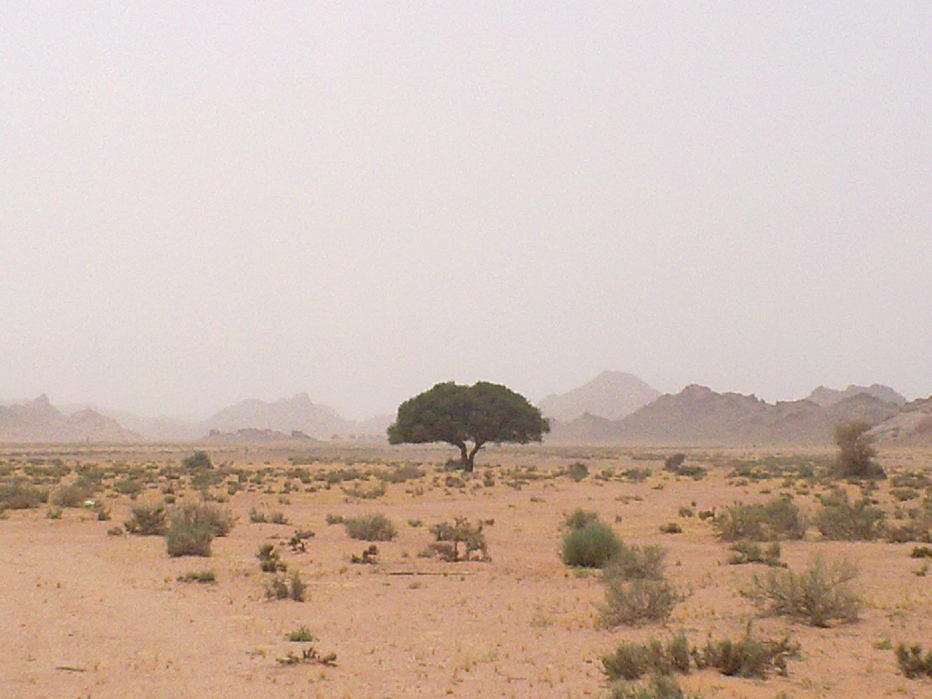 طلحة بزاخة- Tree bzakhah